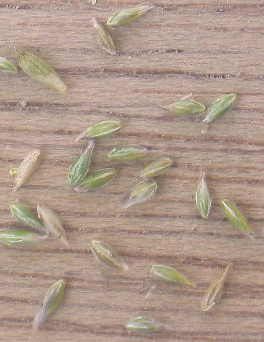 Straatgras vruchten) Poa annua fruits (seeds